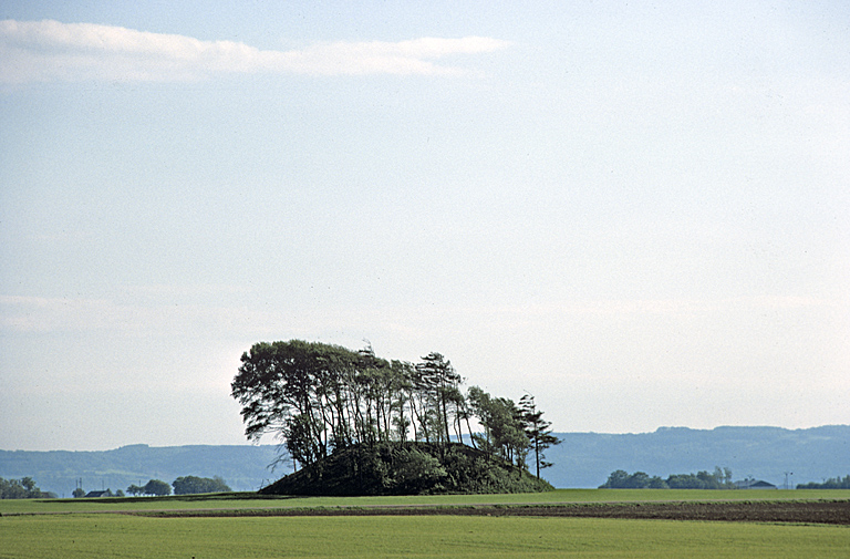 Gravhögen med omgivande odlingsmark. Bilden troligen från mitten av 1970-talet. Motiv: Laholm 17:1 Nyckelord: Riksintressen Kategori: Slättbygd, Hög Gravhögen med omgivande odlingsmark. Bilden troligen från mitten av 1970-talet. Laholm 17:1.